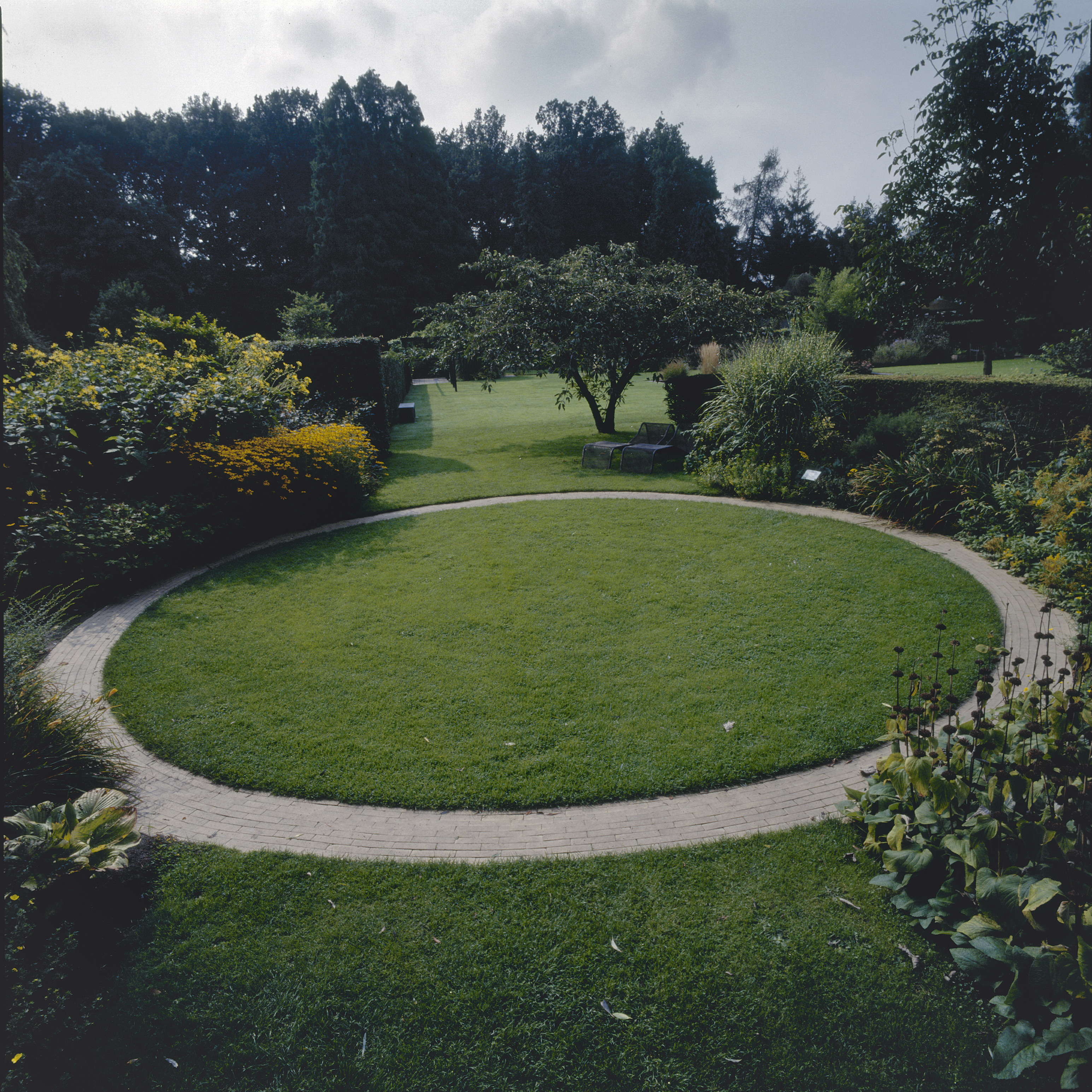 De tuinen van Mien Ruys: Overzicht van de gele tuin uit 1982